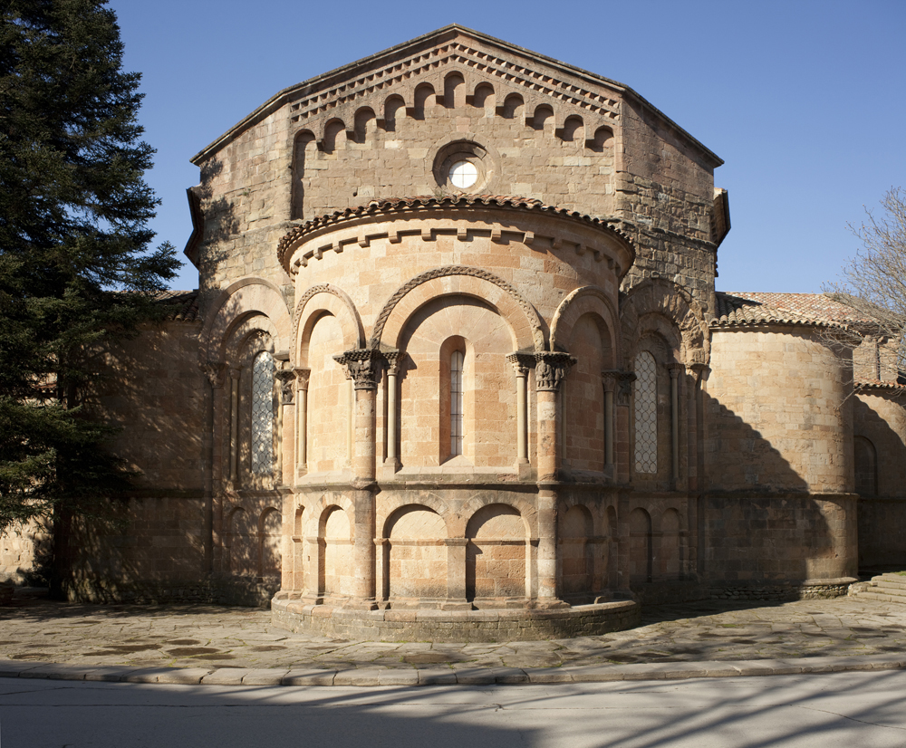 Monestir de Sant Joan de les Abadesses al Ripollès